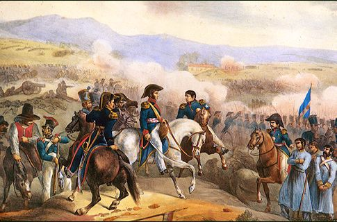 Batalla de Maipo. Litografía coloreada. c.1819.